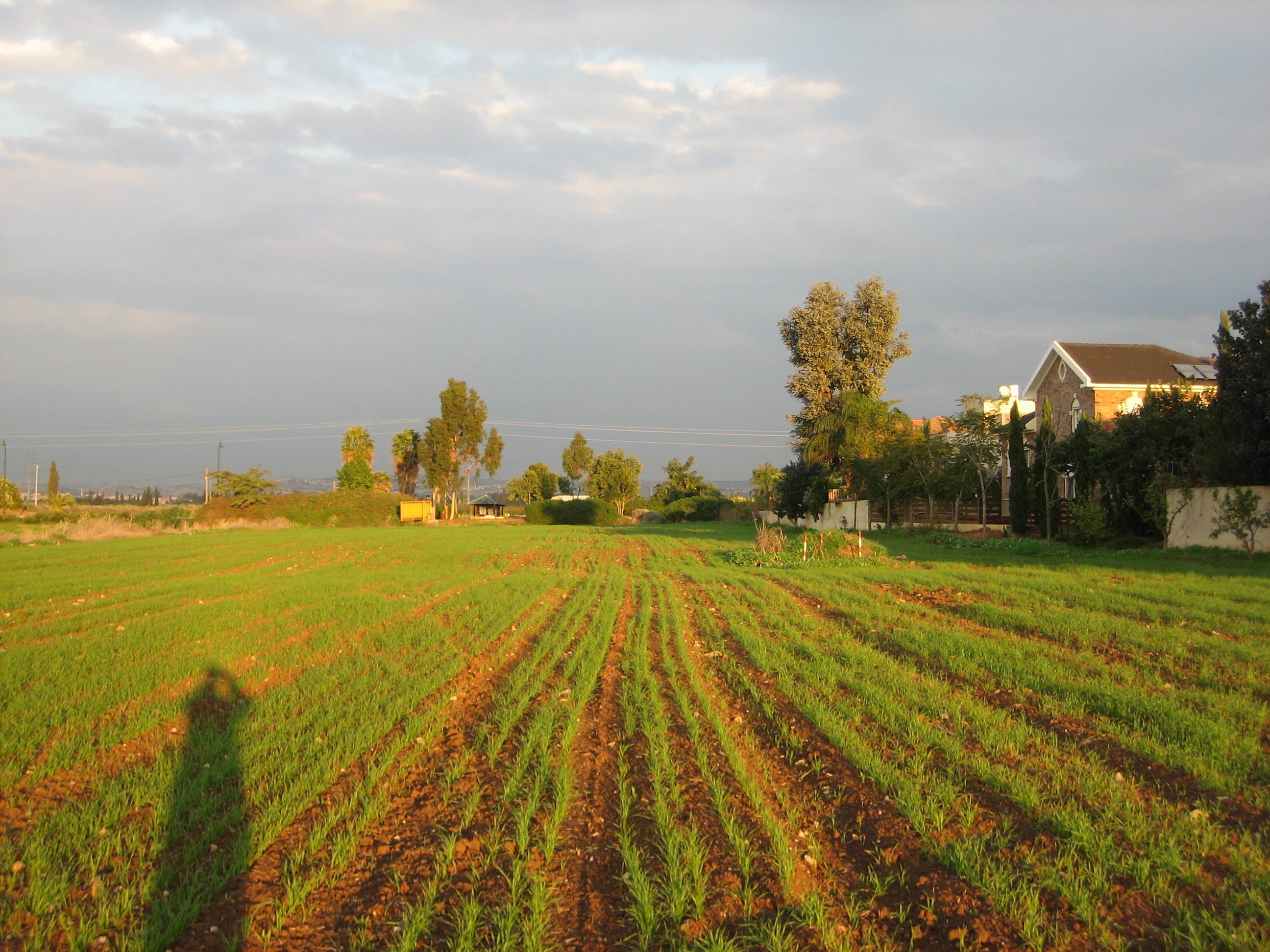 השדות בכניסה למושב נווה ירק